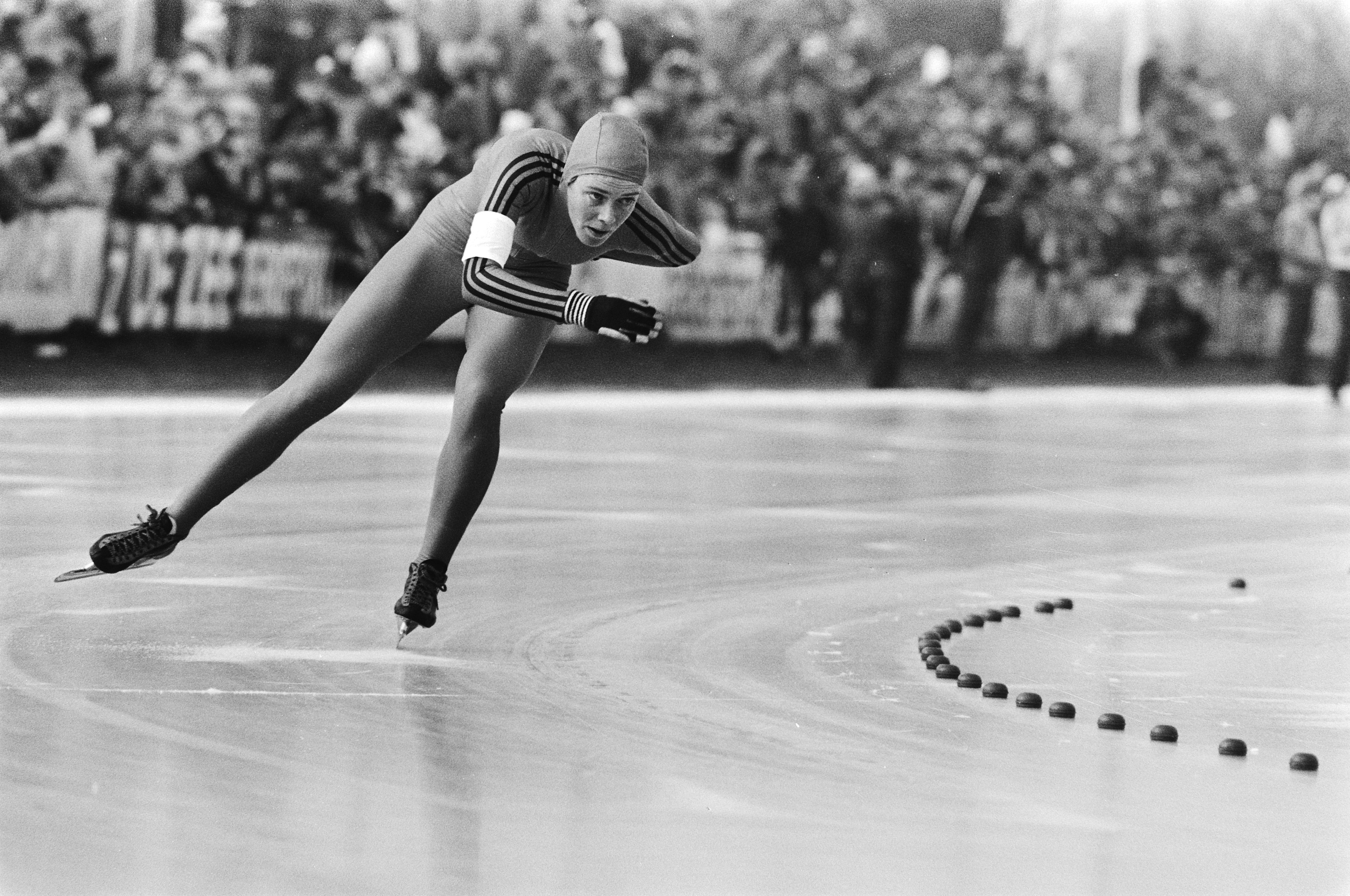 Collectie / Archief : Fotocollectie Anefo Reportage / Serie : EK schaatsen vrouwen in Heerenveen Beschrijving : Ina Steenbruggen in actie Datum : 23 januari 1983 Locatie : Friesland, Heerenveen Trefwoorden : schaatsen, schaatswedstrijden, sport Persoonsnaam : Ina Steenbruggen Fotograaf : Bogaerts, Rob / Anefo Auteursrechthebbende : Nationaal Archief Materiaalsoort : Negatief (zwart/wit) Nummer archiefinventaris : bekijk toegang 2.24.01.05 Bestanddeelnummer : 932-4754